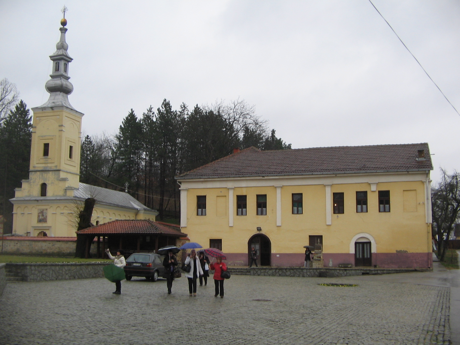 Манастир Боговађа